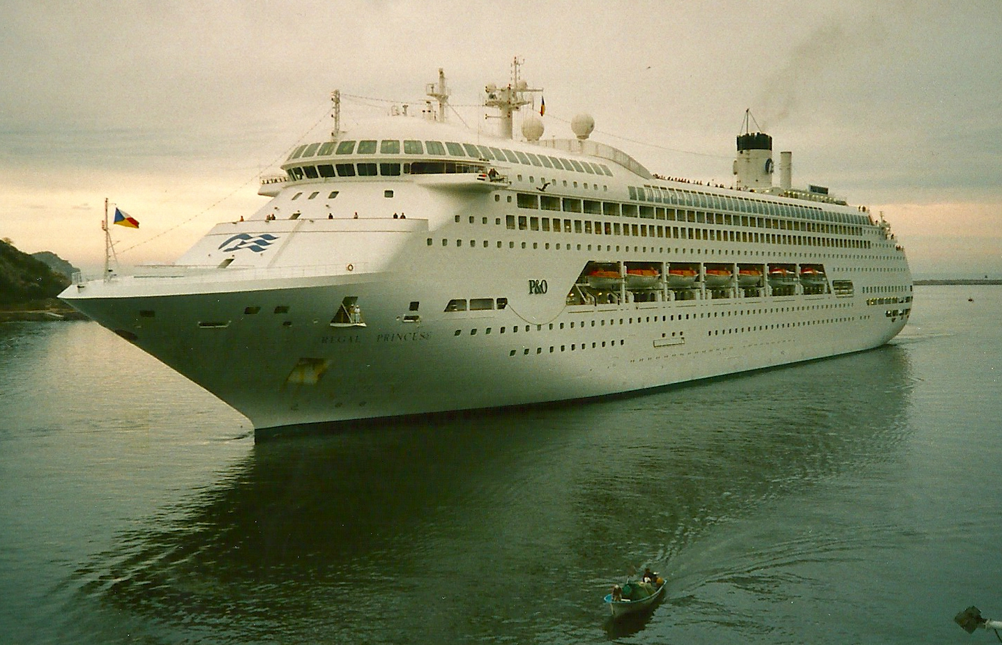 Hafen Mazatlan Mexico